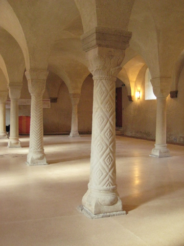 Refektorium Kloster Ilsenburg 2008